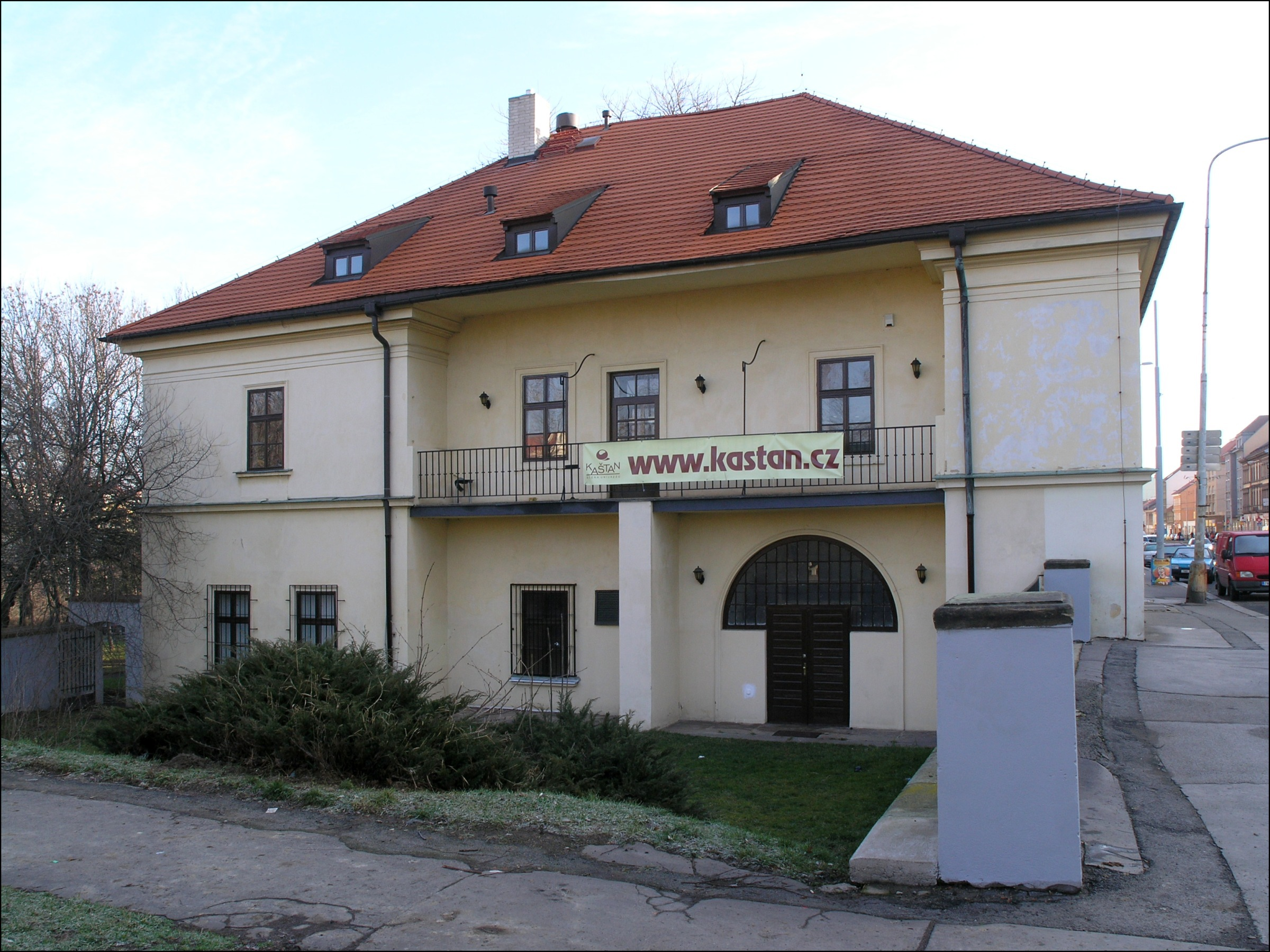 Česky: Kulturní dům Kaštan v Praze 6, Břevnově